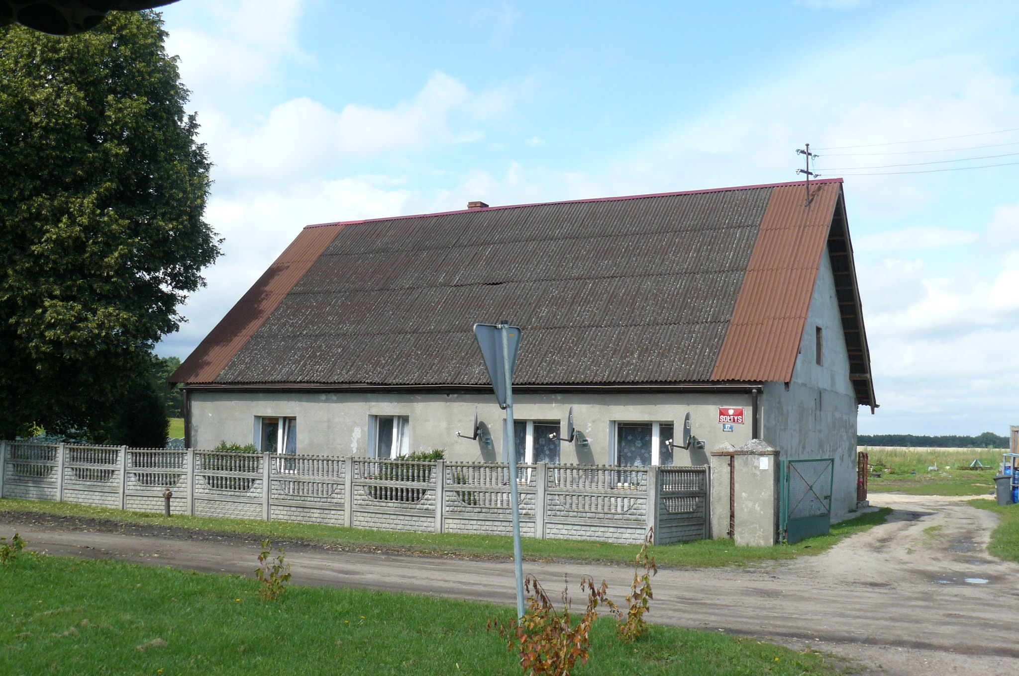 Niedźwiedziny w Puszczy Zielonce.